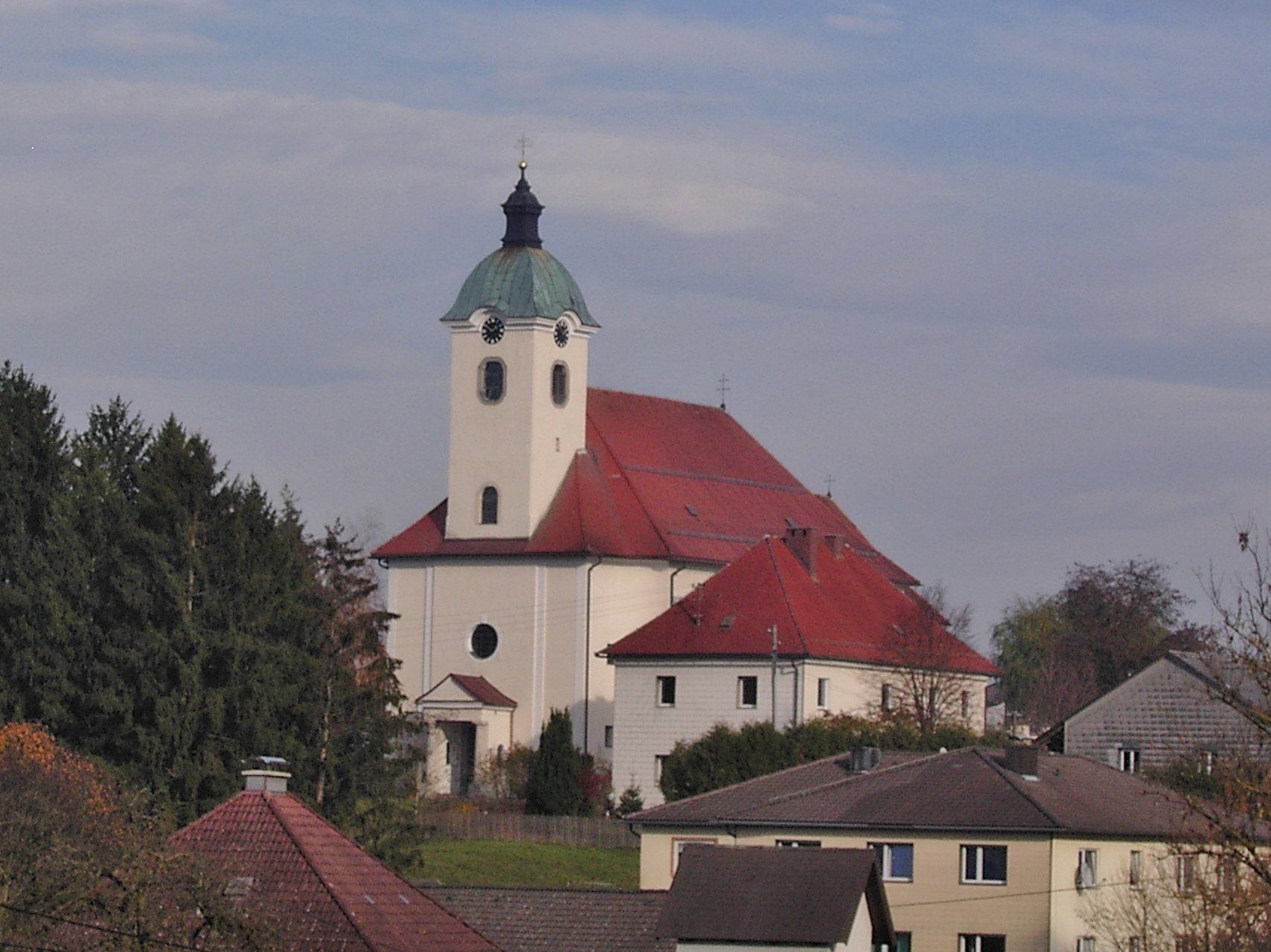 Schiedlberg Kath.Pfarrkirche Mariä Verkündigung Kirchenplatz